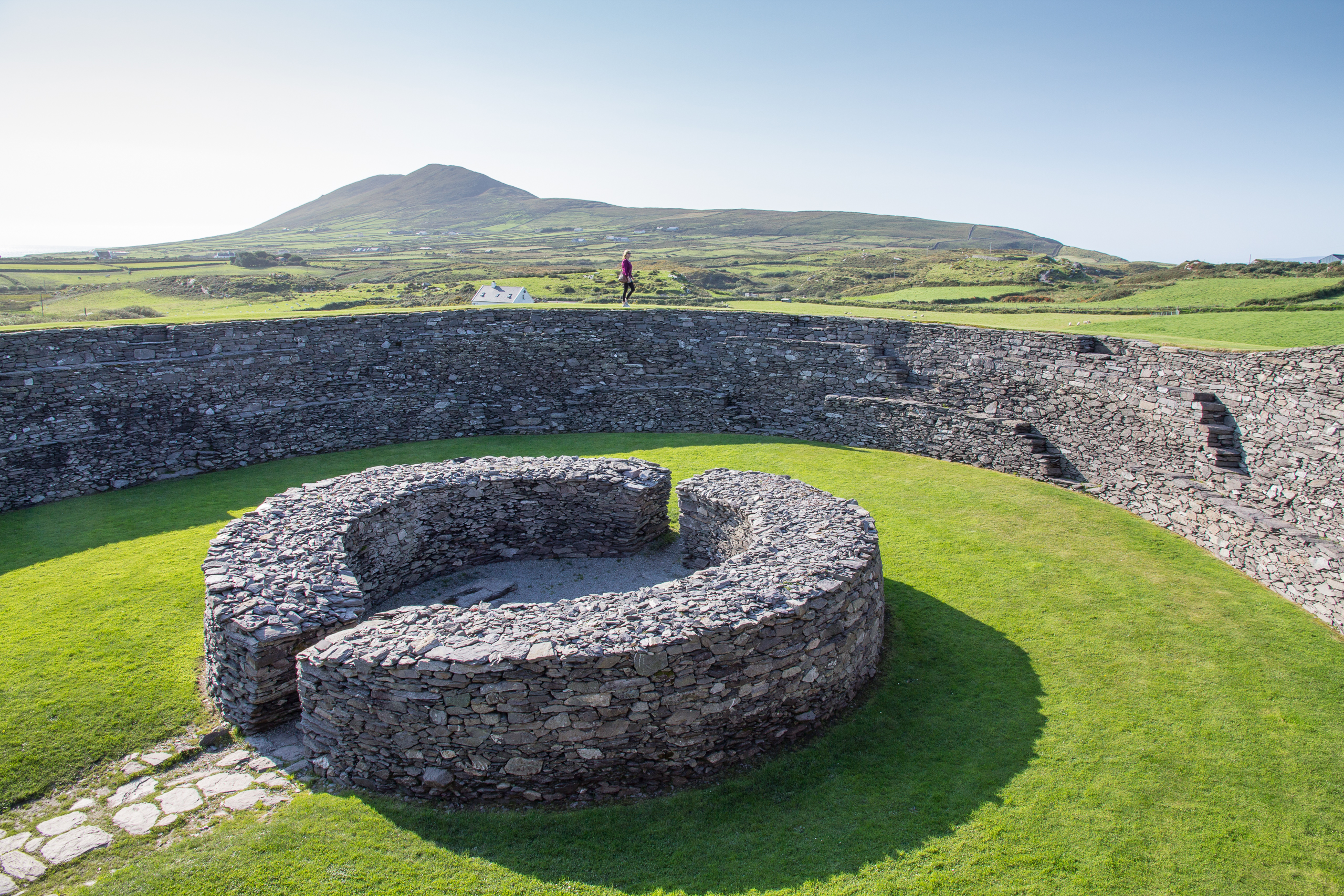 Inside Cahergall Stone Fort